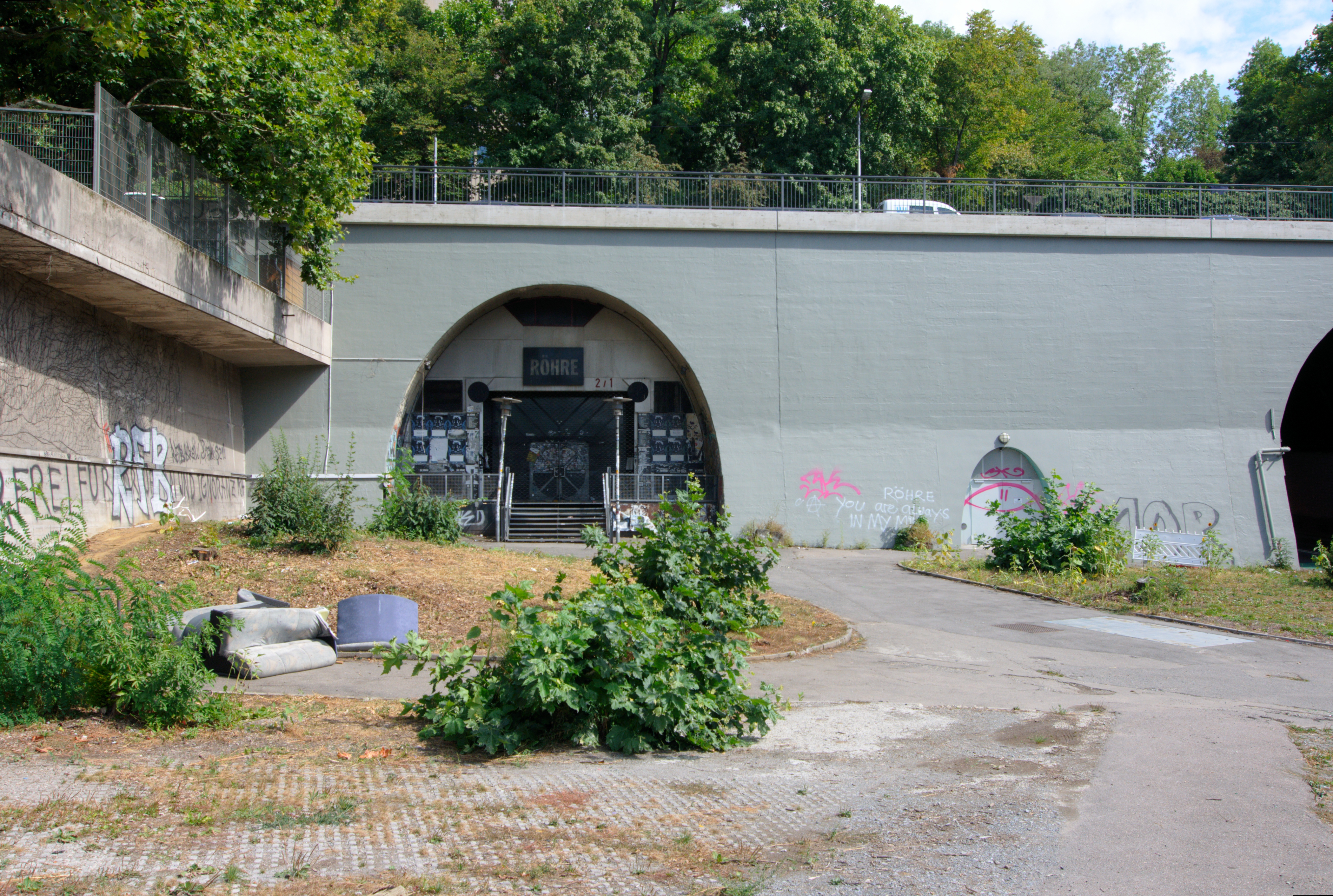 Wagenburgtunnel in Stuttgart, Eingang der geschlossenen Nordröhre